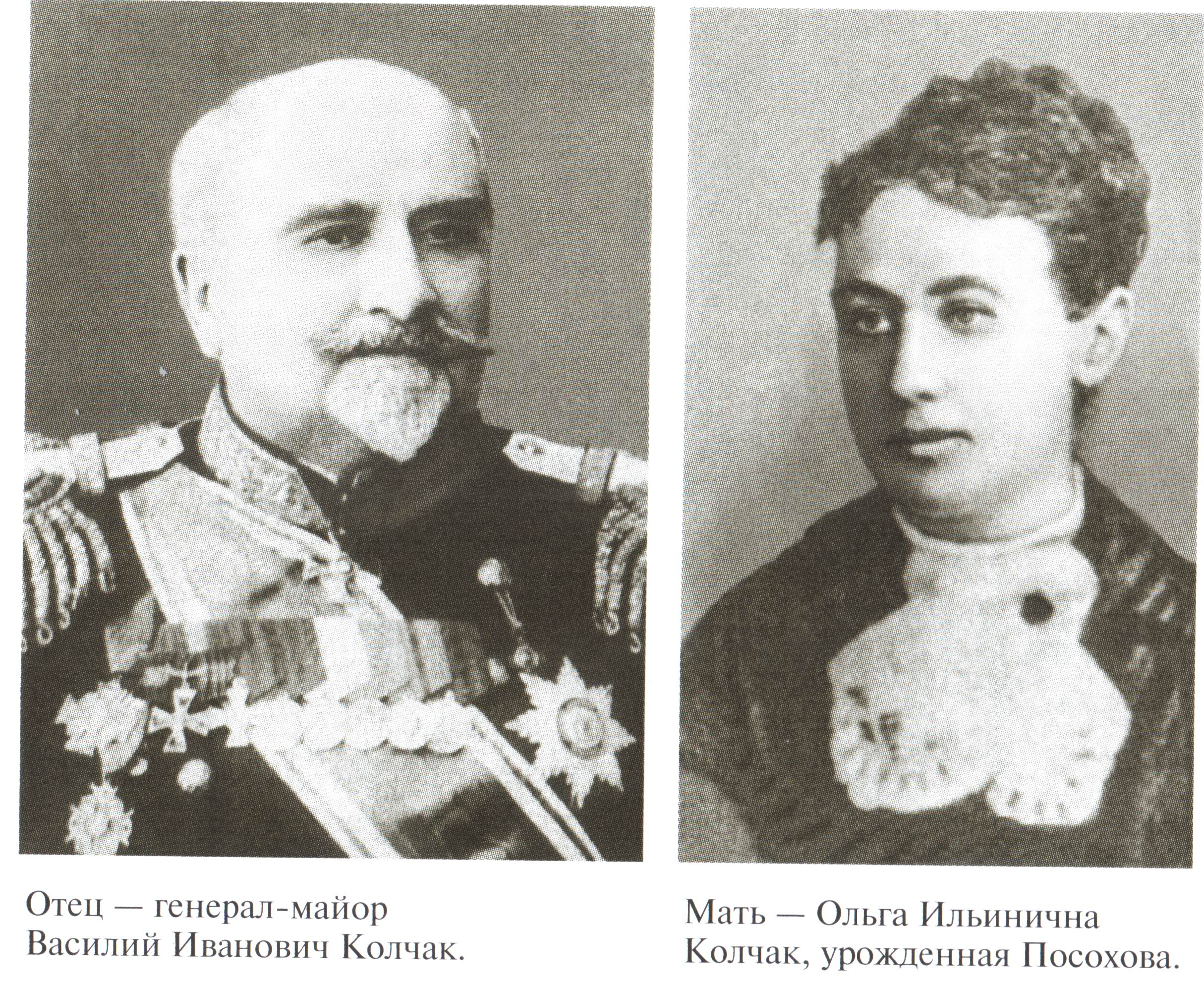 Родители А.В. Колчака. Василий Иванович Колчак и Ольга Ильинична